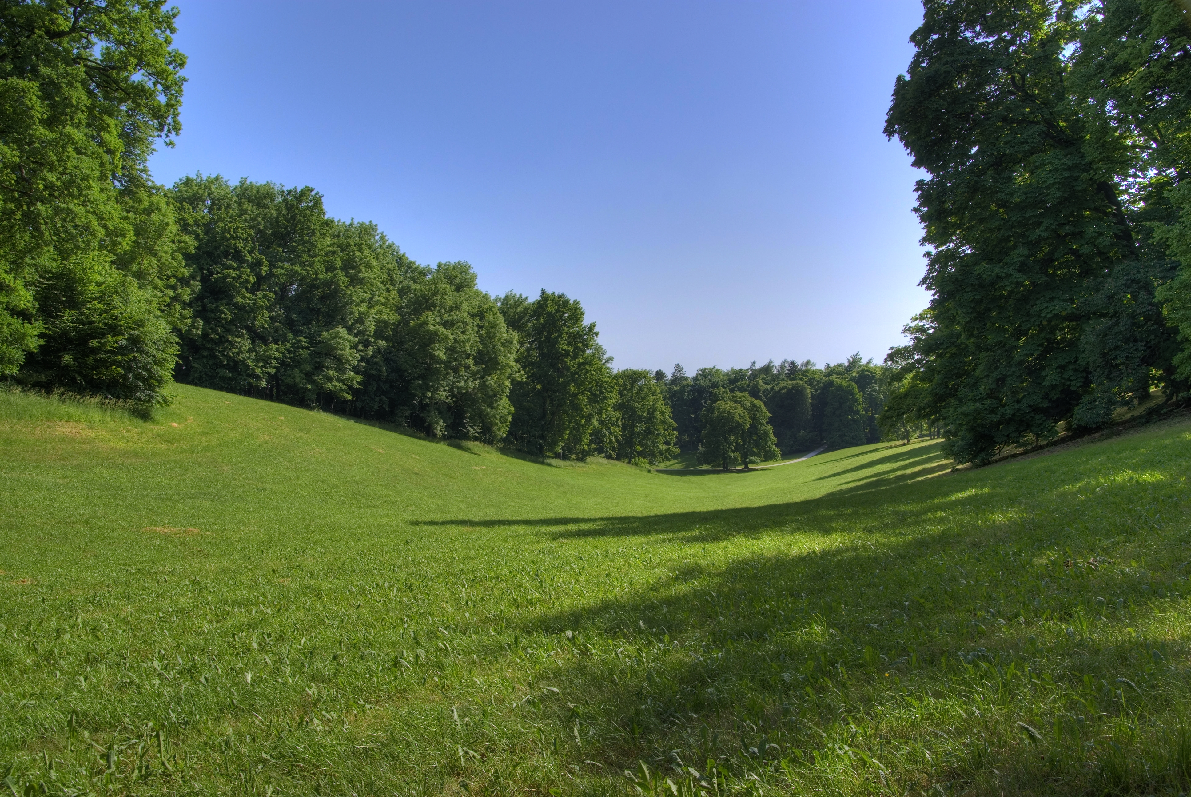 Das Veilchental im Hofgarten in Coburg.